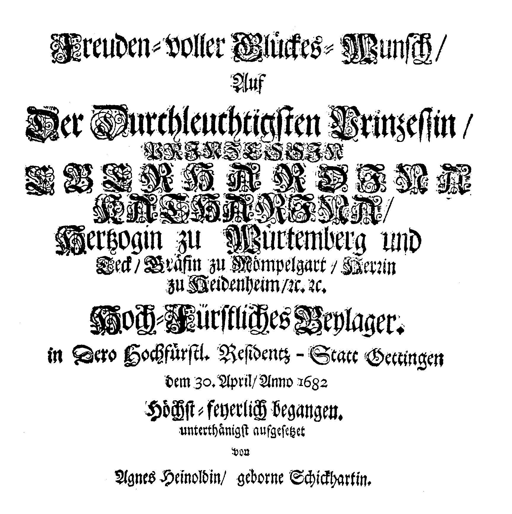 Gedicht zur Hochzeit der Prinzessin Eberhardina Katharina, Hertzogin zu Würtemberg und Teck, Gräfin zu Mömpelgart, Herrin zu Heidenheim am 30.4.1682; Titelseite